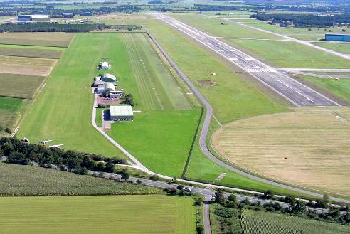 Anflug auf die Piste 08 in Nordholz-Spieka